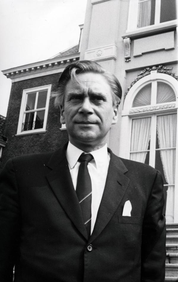 Gerard H. Veringa, KVP-fractieleider. Den Haag, Nederland, 13 mei 1971